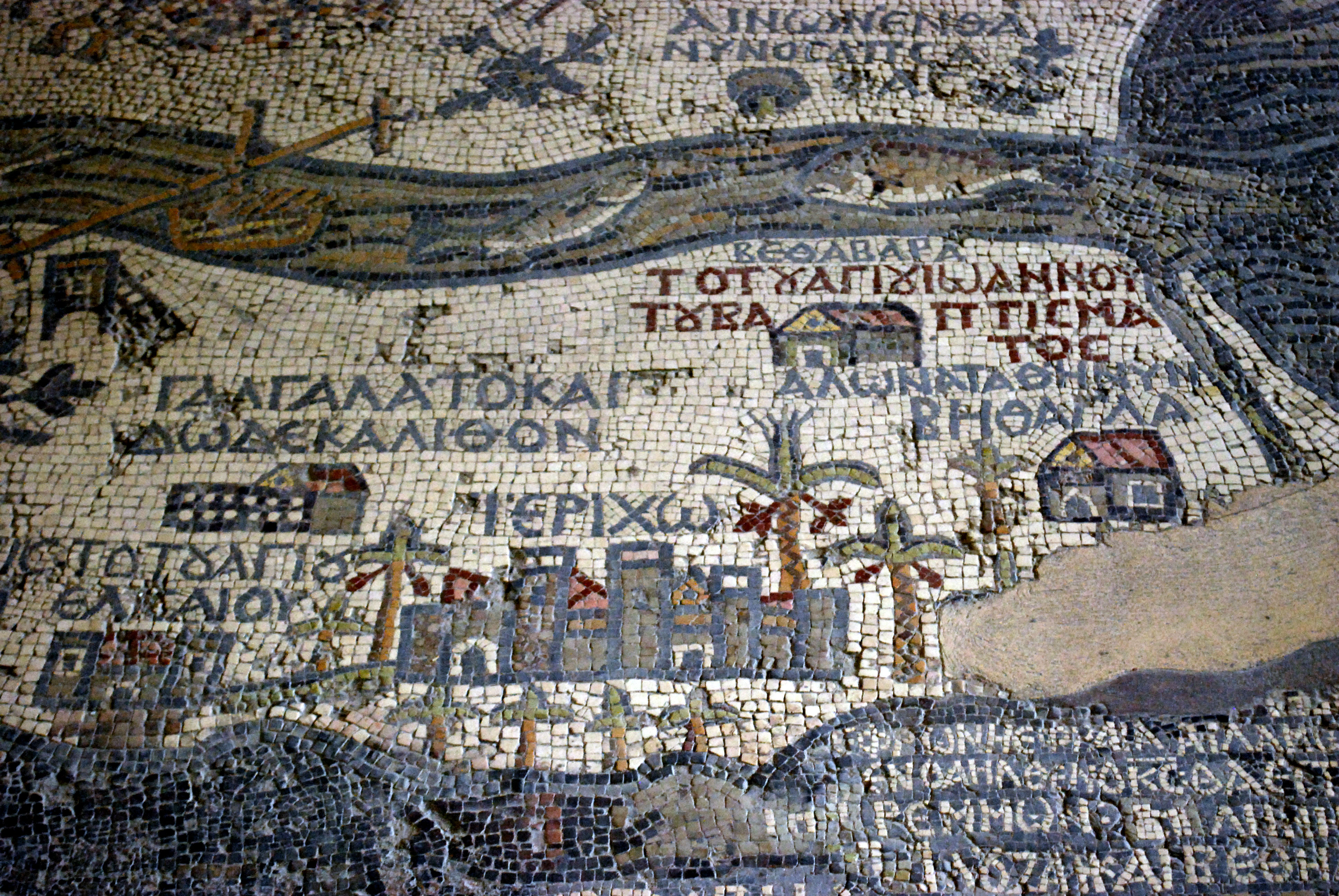 La carte de la Palestine, mosaïque du VIe siècle dans l'église Saint-Georges à Madaba (Jordanie) : détail de la zone de Jéricho et de l'embouchure du Jourdain dans la Mer Morte.